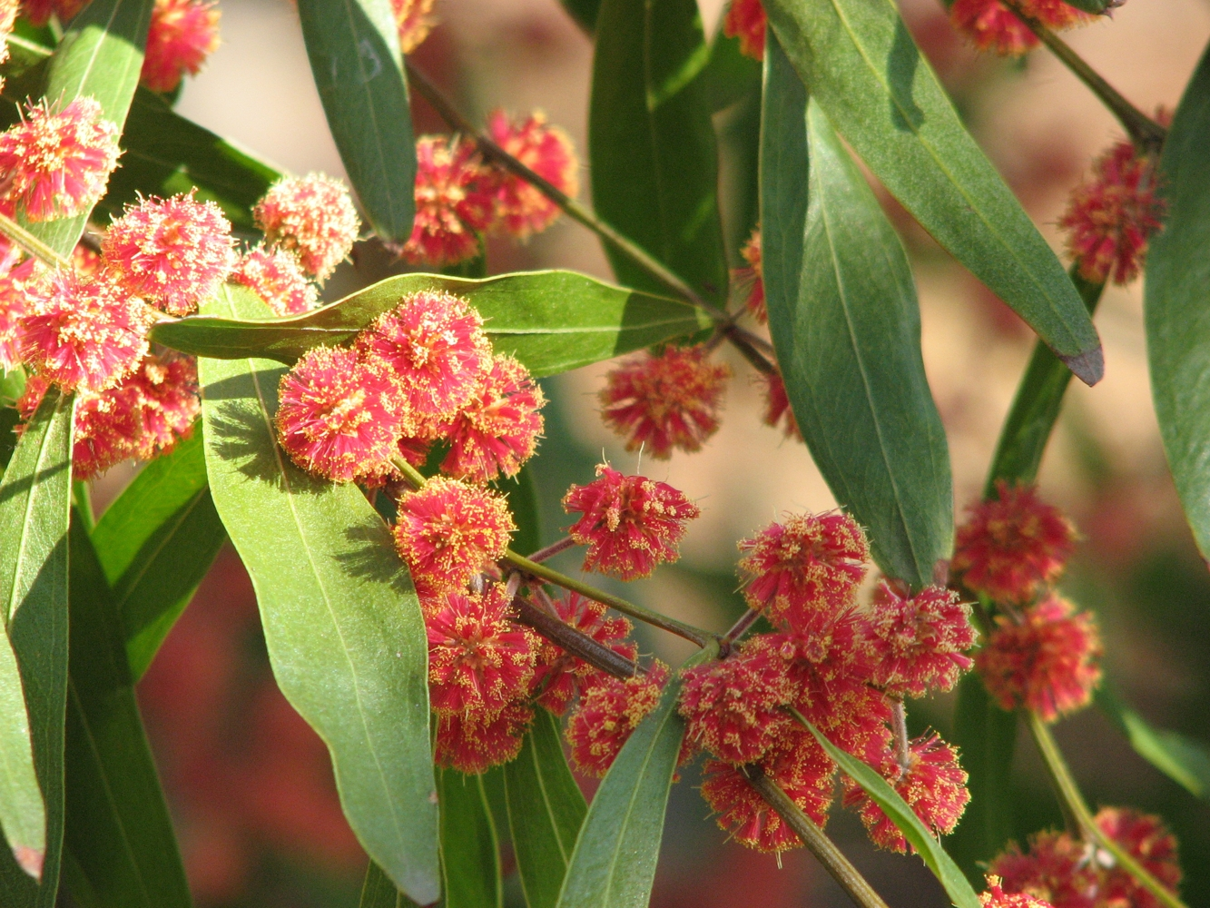 Acacia leprosa 'Scarlet Blaze' (cultivated, labelled) Maranoa Gardens, Balwyn, Victoria, Australia